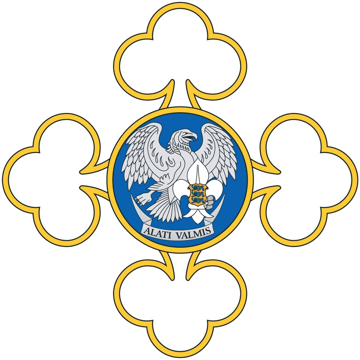 Kodutütarde logo